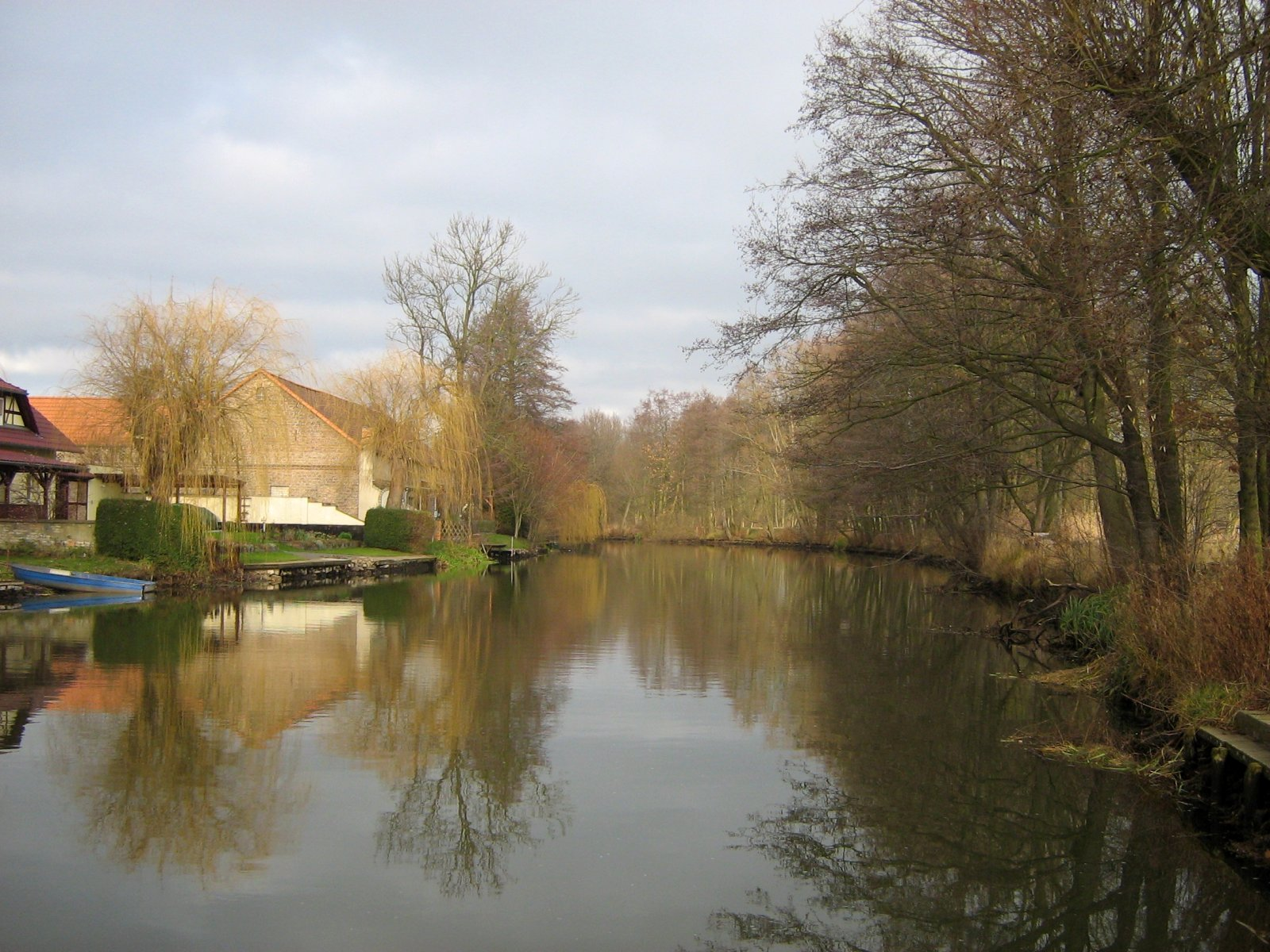 Die Spree bei Leibsch im Unterspreewald (Landkreis Dahme-Spreewald, Brandenburg.)